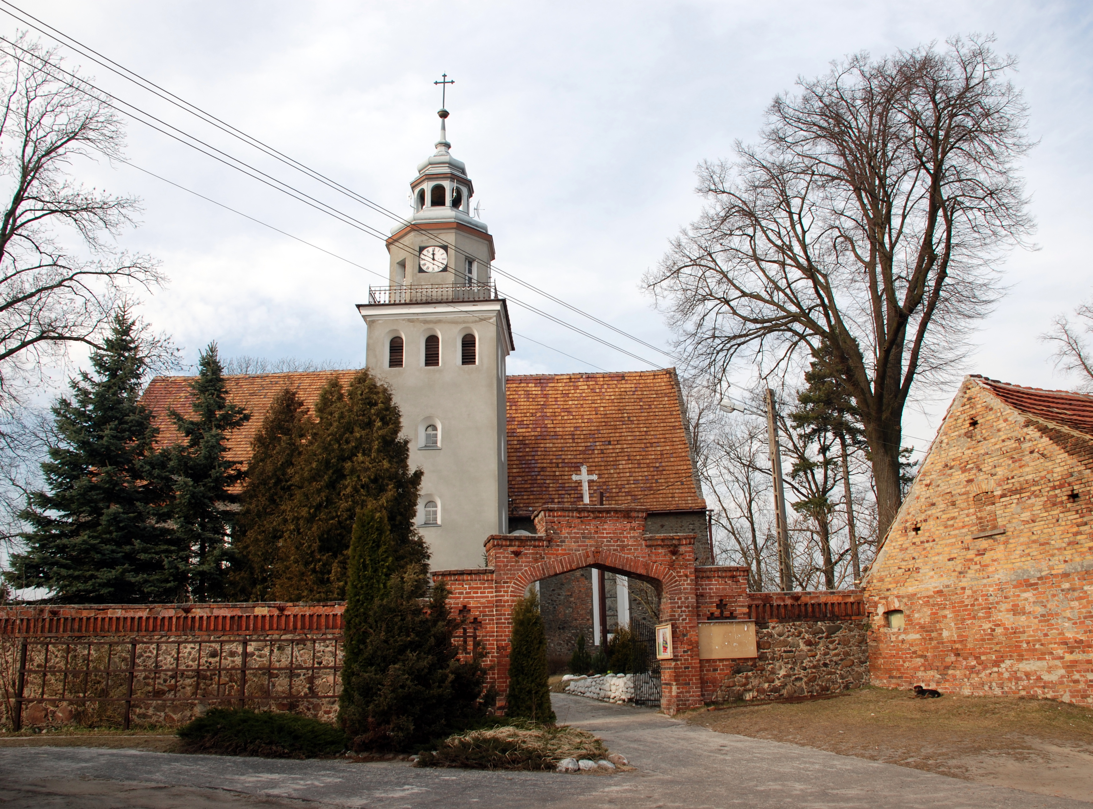 Niwica - kościół parafialny p.w. Św. Trójcy, XVI, 1 poł. XX